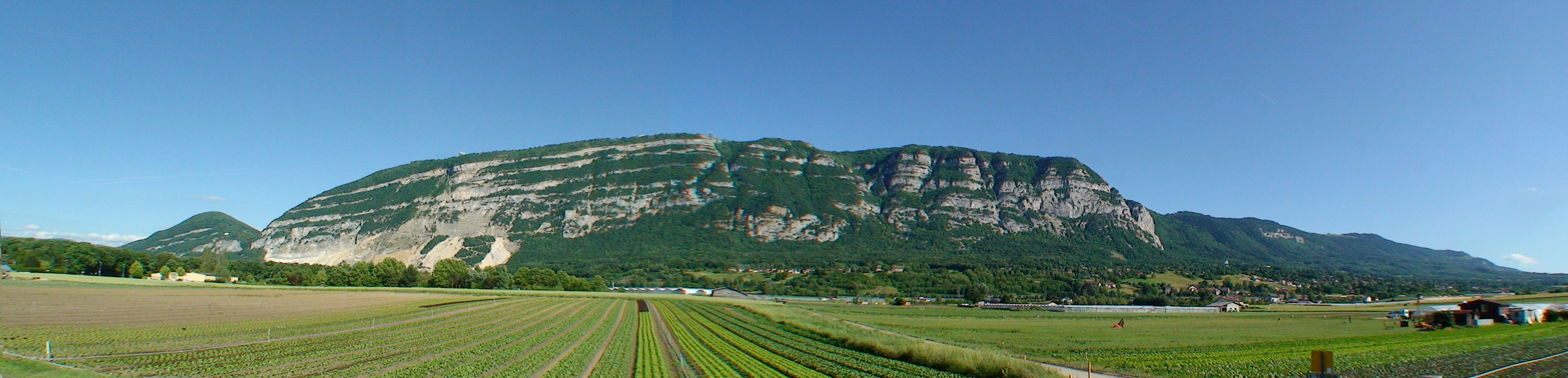 Mont Salève